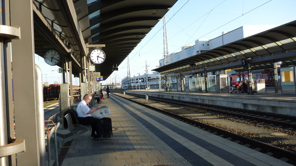 Bahnsteige des Bahnhofs Bamberg, Blick in Richtung Südosten